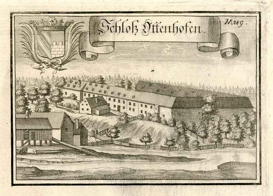 Schloß Ottenhofen, aus: Beschreibung des Churfürsten- u. Hertzogthumbs Ober- und Nidern Bayrn. Rentamt München, 2. Auflage um 1750 1. Auflage von 1701)